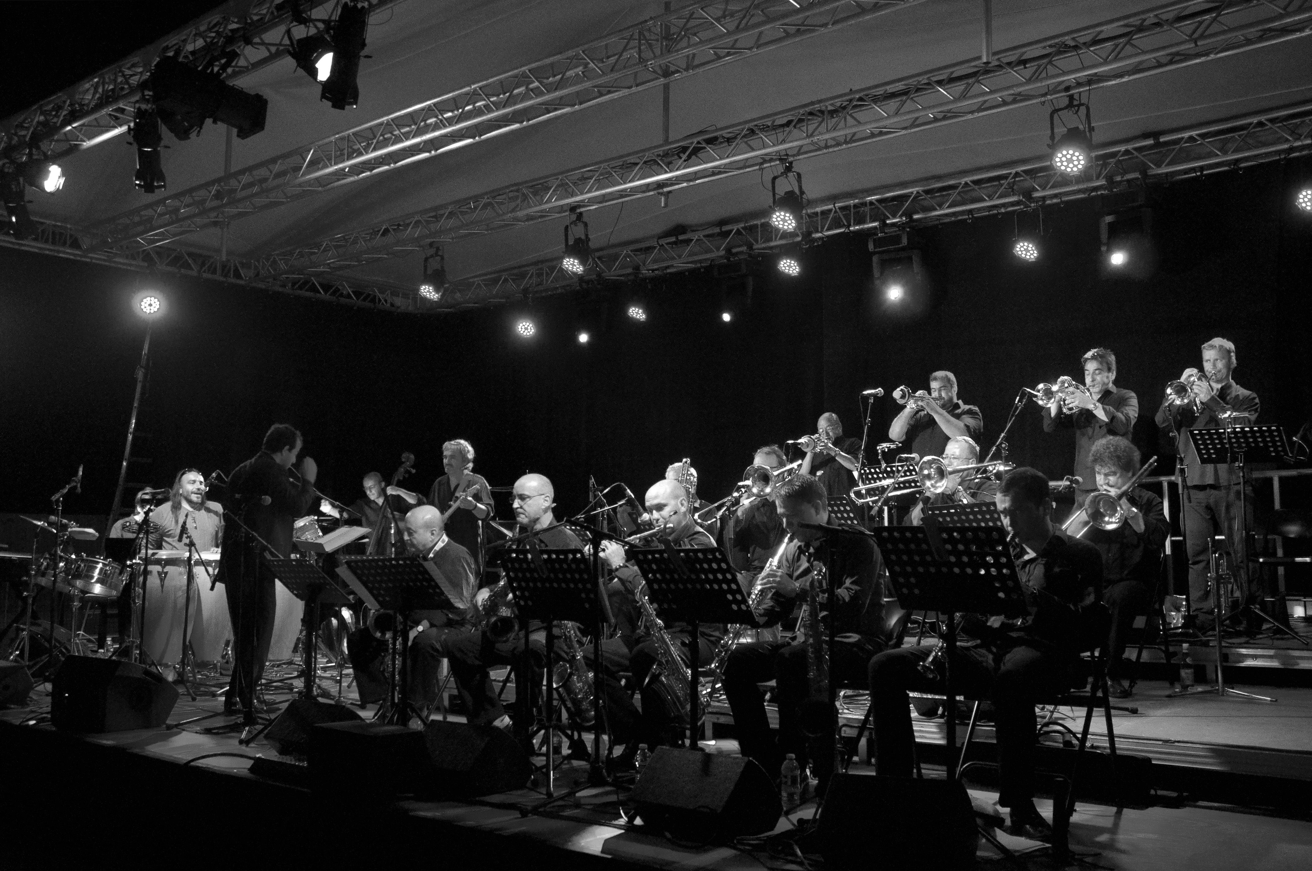 Le Nice Jazz Orchestra, Big Band dirigé par Pierre Bertrand, le 2011-08-10, à Cap d'Ail (Alpes Maritimes) au cours du festival "Cap Jazz".